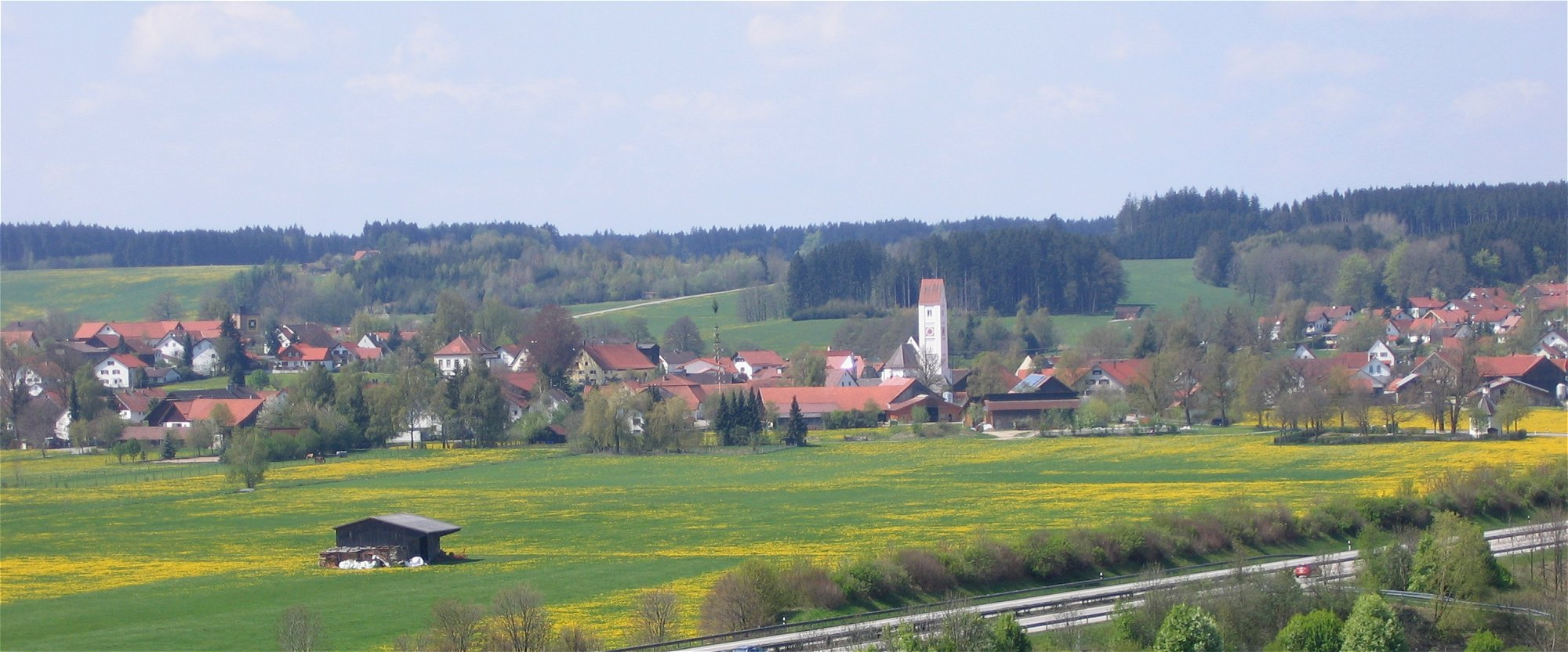 Bad Wörishofen, Ortsteil Kirchdorf